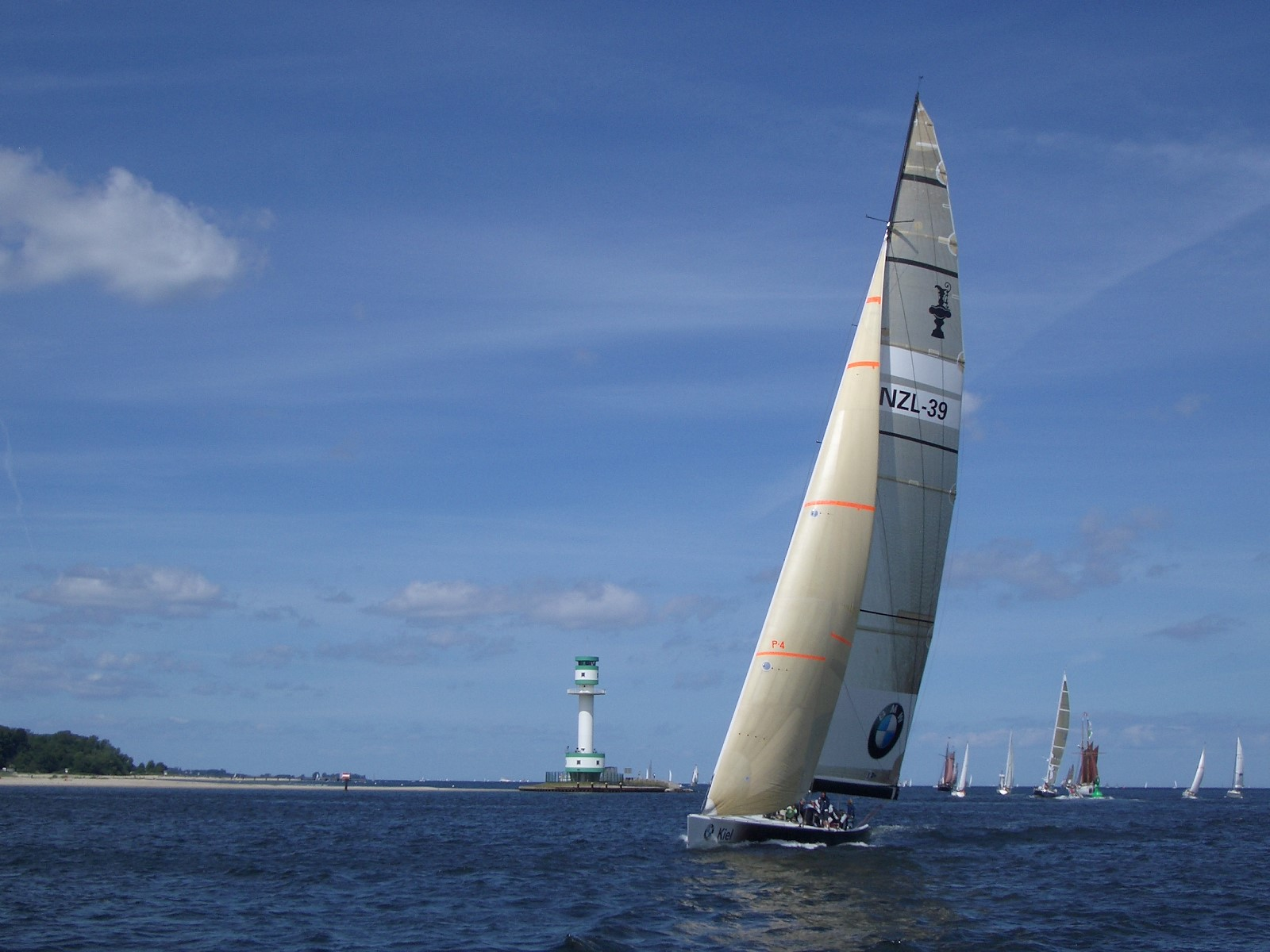 America's Cup Yacht NZL-39 auf der Kieler Förde. Im Hintergrund: Der Leuchtturm von Friedrichsort und der Falckensteiner Strand.